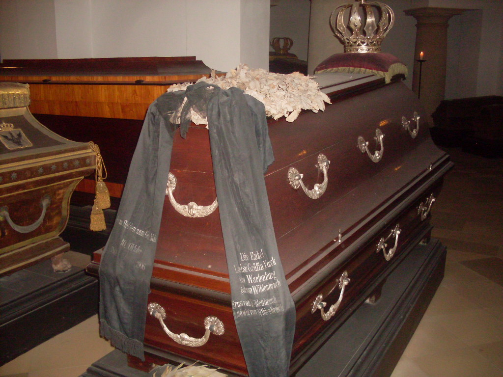 Sarkophag Louis Ferdinands von Preußen in der Hohenzollerngruft des Berliner Domes (Nr. 73)